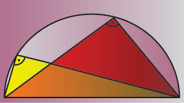 Halbkreis mit Dreiecken und rechten Winkeln